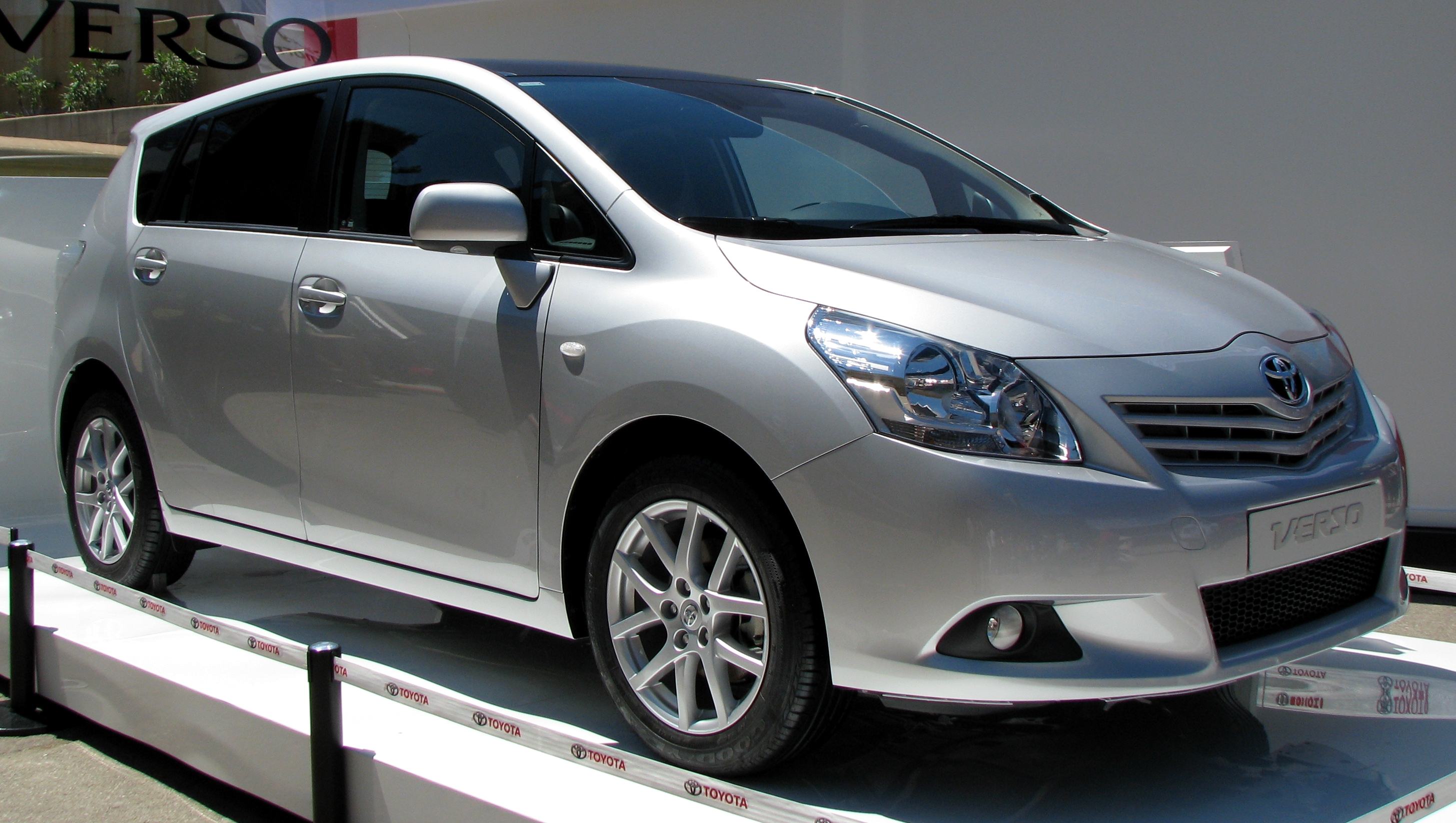 Toyota Verso en el Salón Internacional del Automóvil de Barcelona 2009.